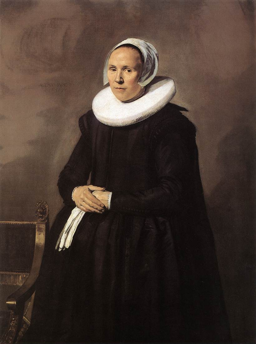 Portrait of Feyntje van Steenkiste. Pendant of File:Frans Hals 034.jpg.